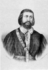 Grabado que representa al cronista Pedro López de Ayala (1332-1407), que fue señor de Ayala, merino mayor de Guipúzcoa y alférez mayor del pendón de la Orden de la Banda.